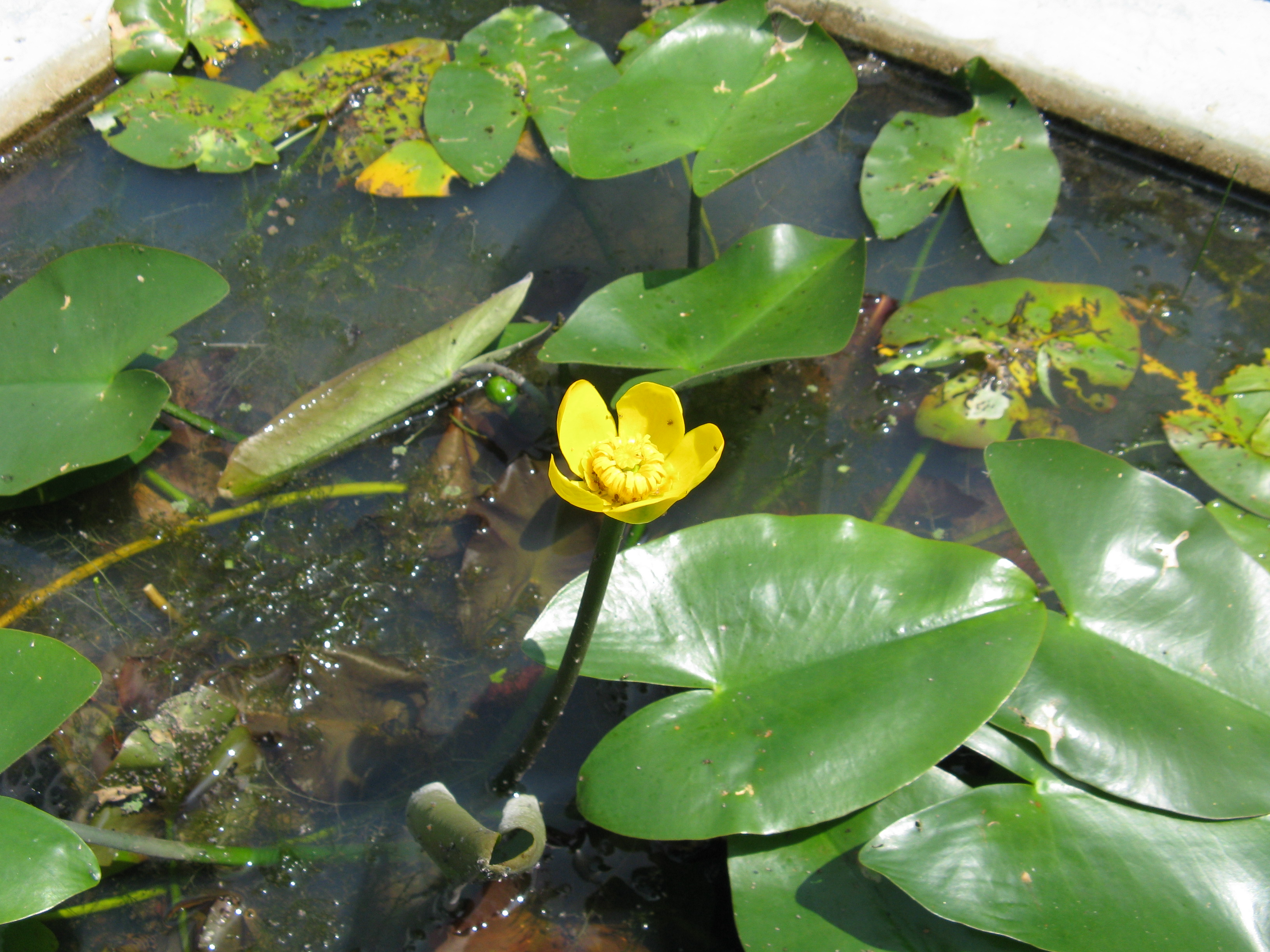 Scientific name Nuphar japonica (syn. N. subintegerrimum)